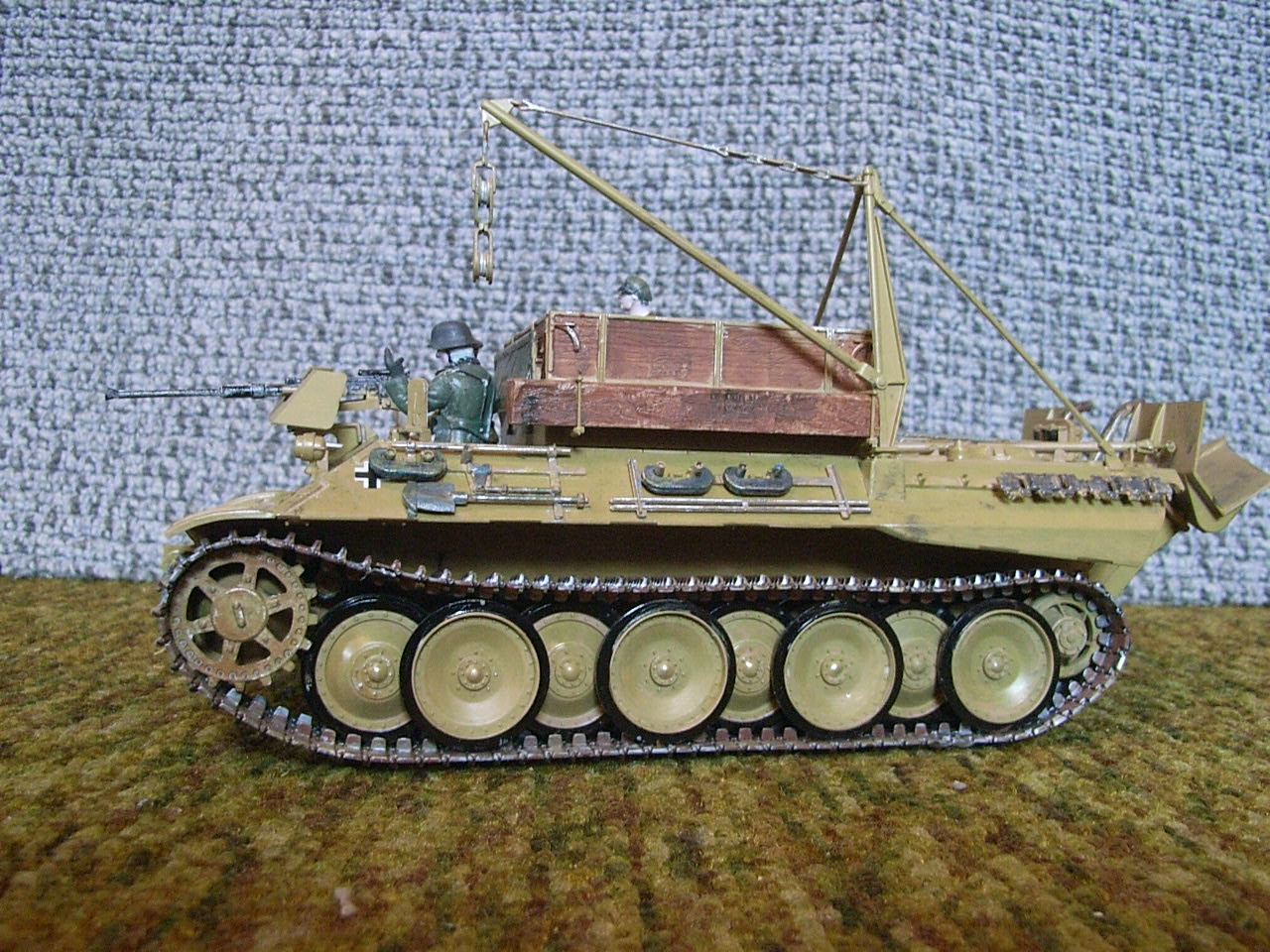 Bergepanther, Seitenansicht (Modell)